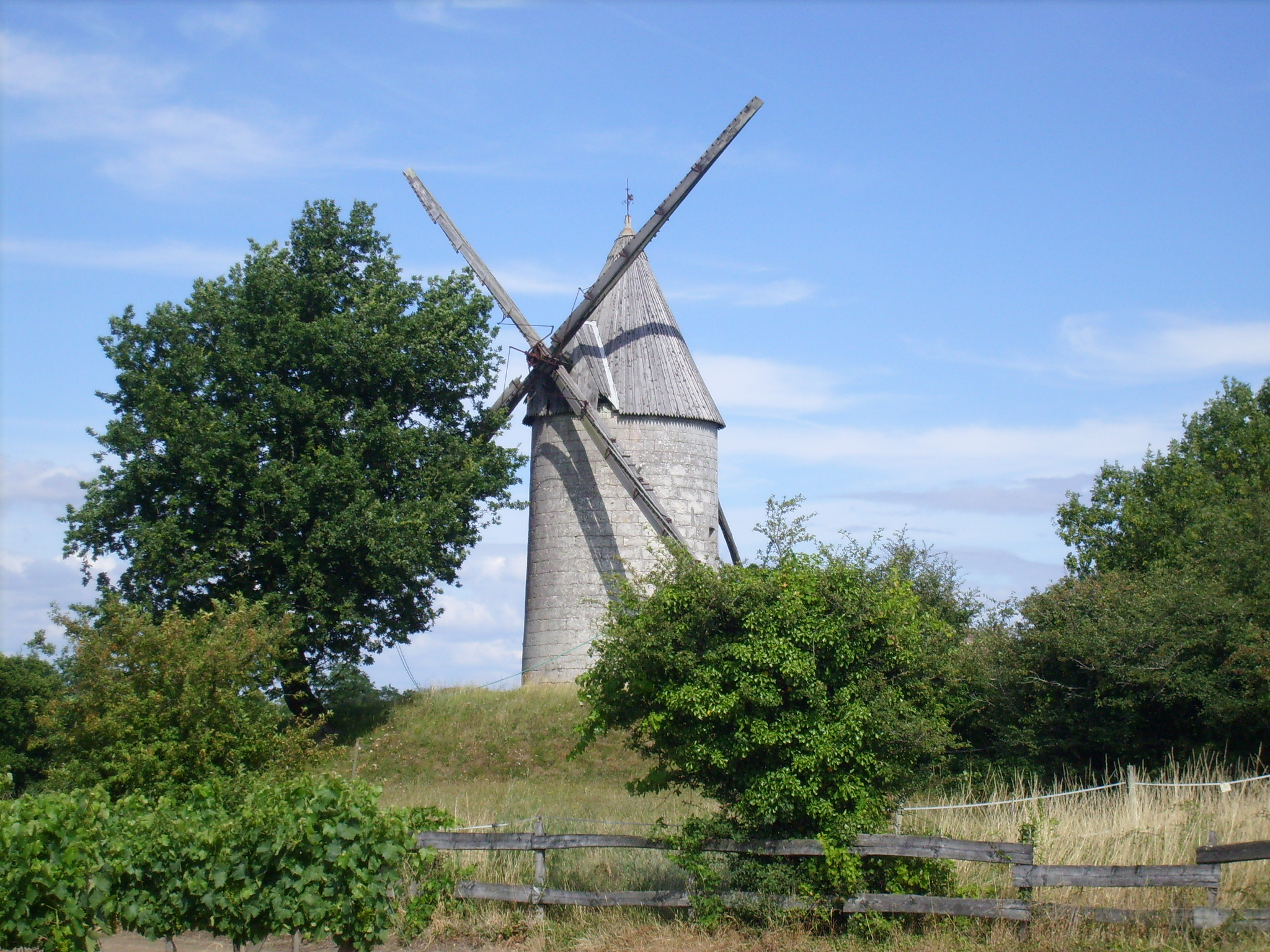 Le moulin de Cônac